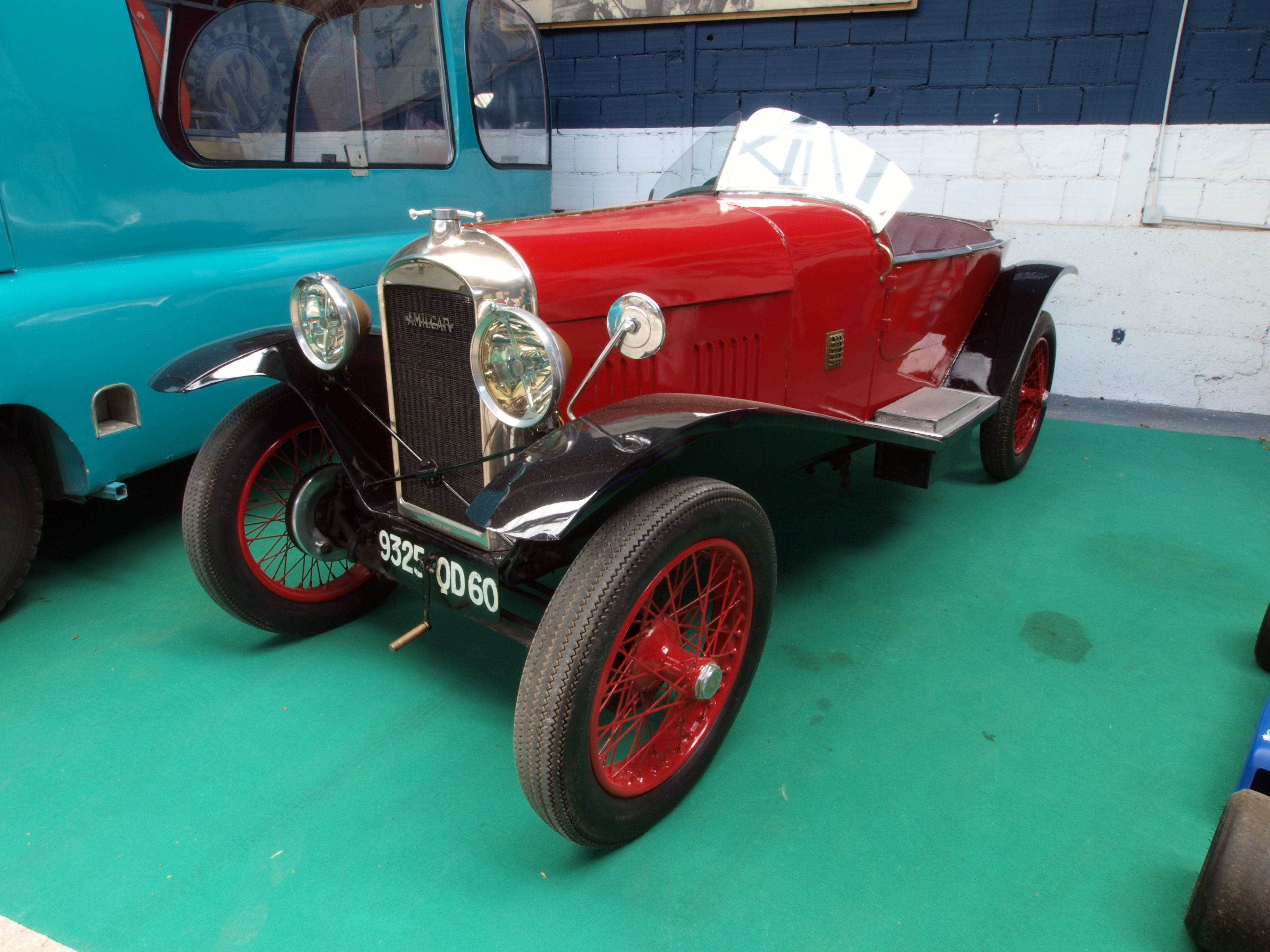 1923 Amilcar C4